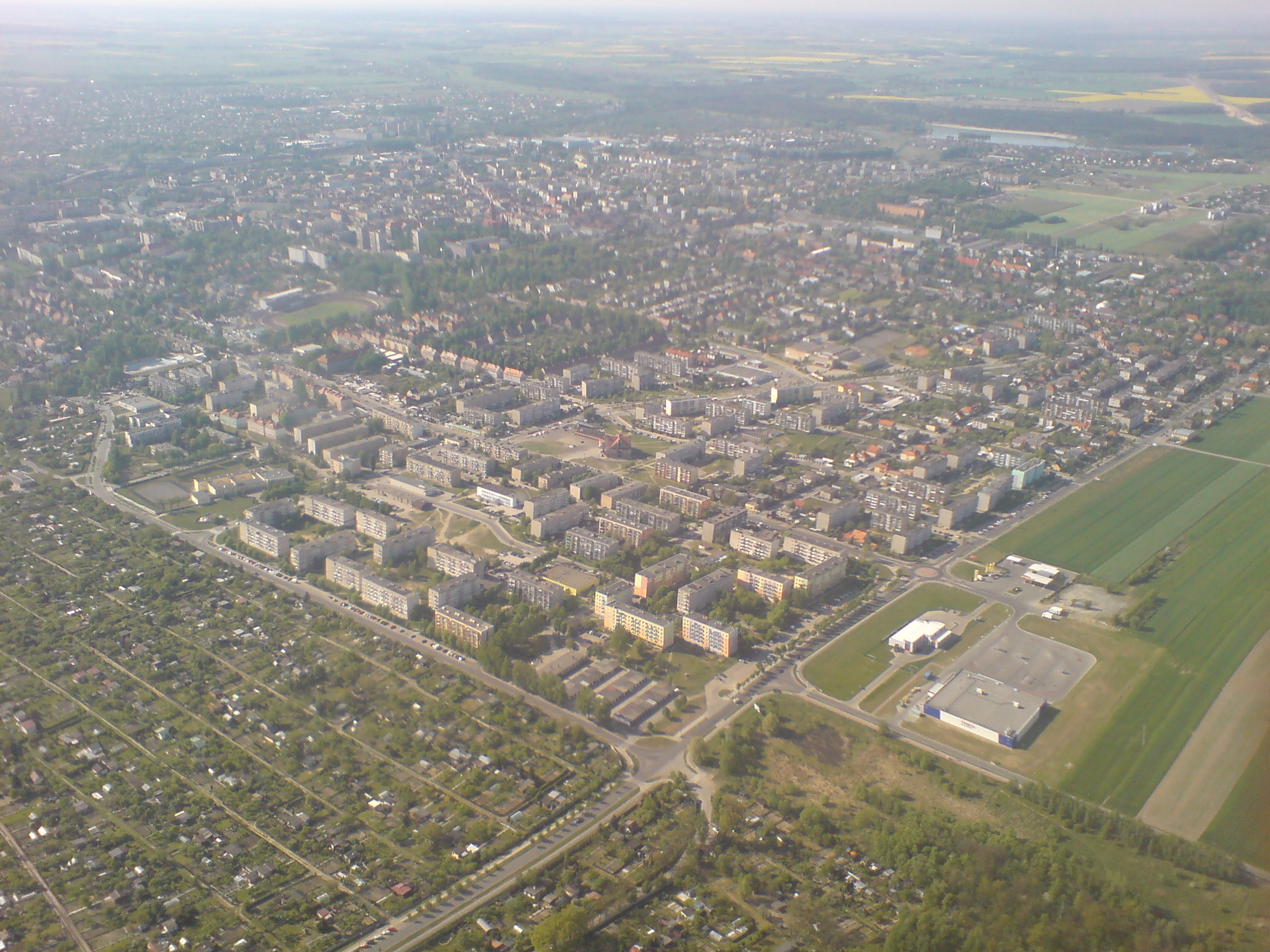 Ostrów Wielkopolski z lotu ptaka